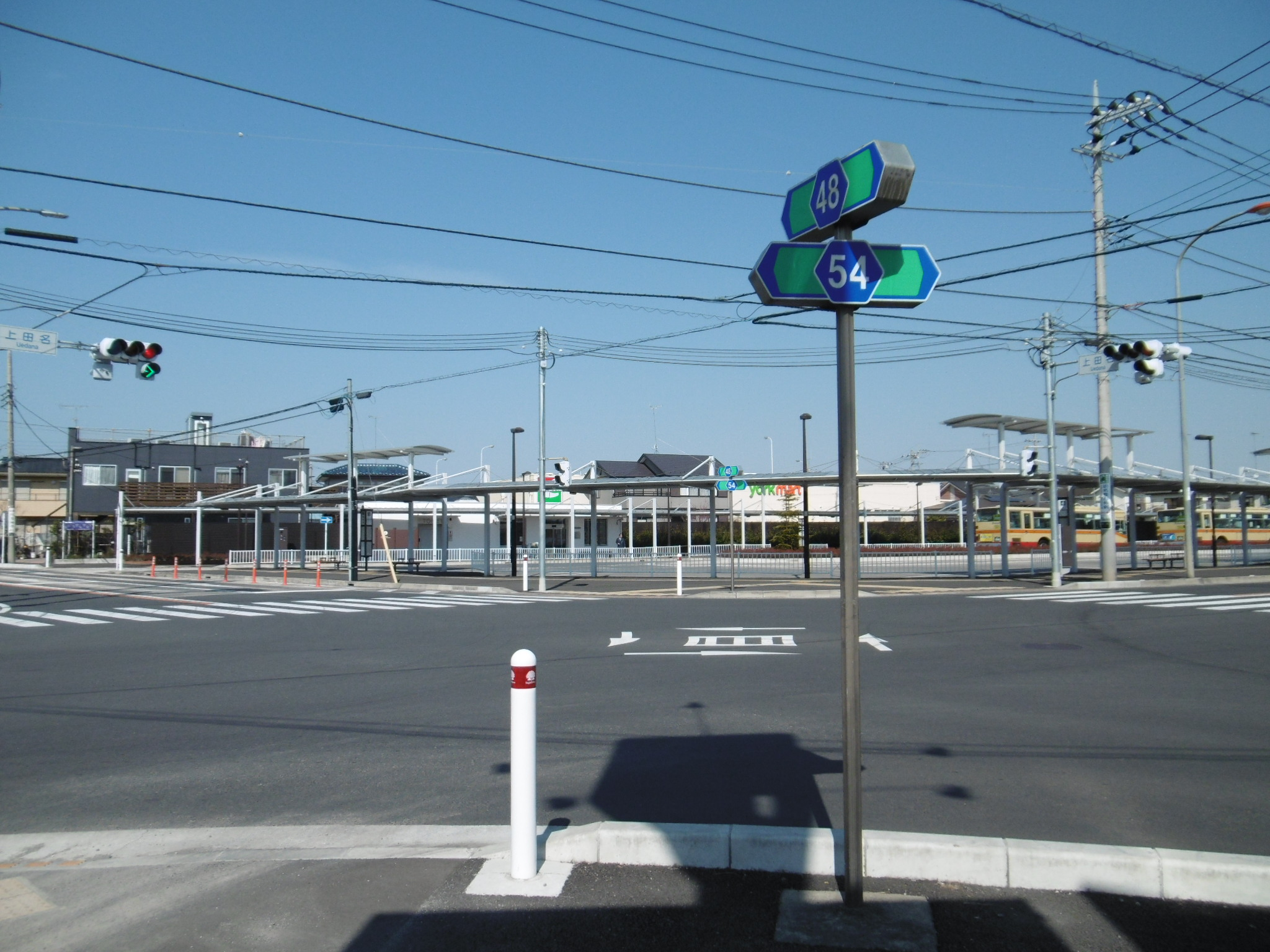 神奈川県相模原市の上田名交差点で接続する神奈川県道48号鍛冶谷相模原線(写真左奥方から)と神奈川県道54号相模原愛川線(写真右奥方から)。真中奥に神奈川中央交通の停留所がある田名バスターミナルが存在する。